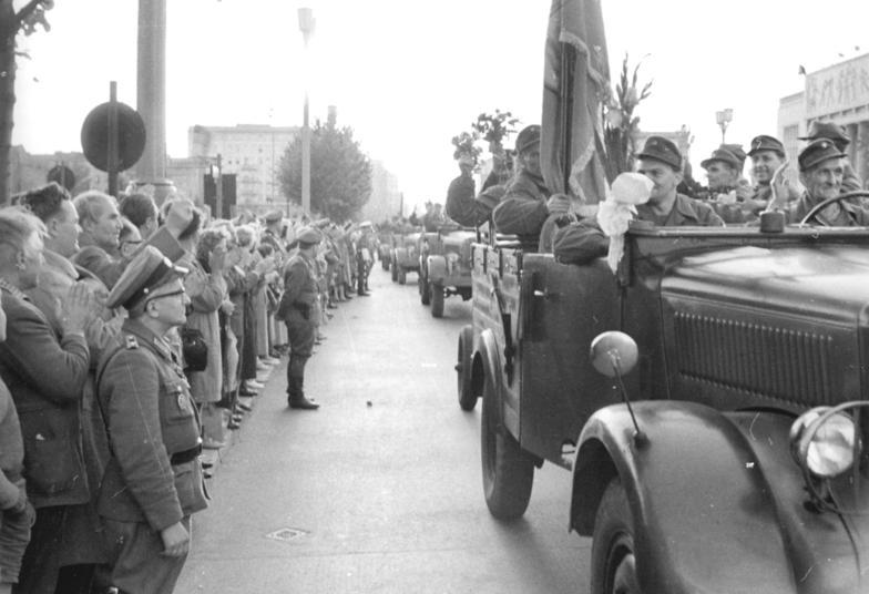 ADN-ZB-23.8.1961-Berlin: Sicherung der Staatsgrenze am 13.8.1961. Appell der Berliner Kampfgruppen am 23.8.1961 in der Karl-Marx-Allee. Veröffentlichung nur mit Genehmigung der Pressestelle des MDI